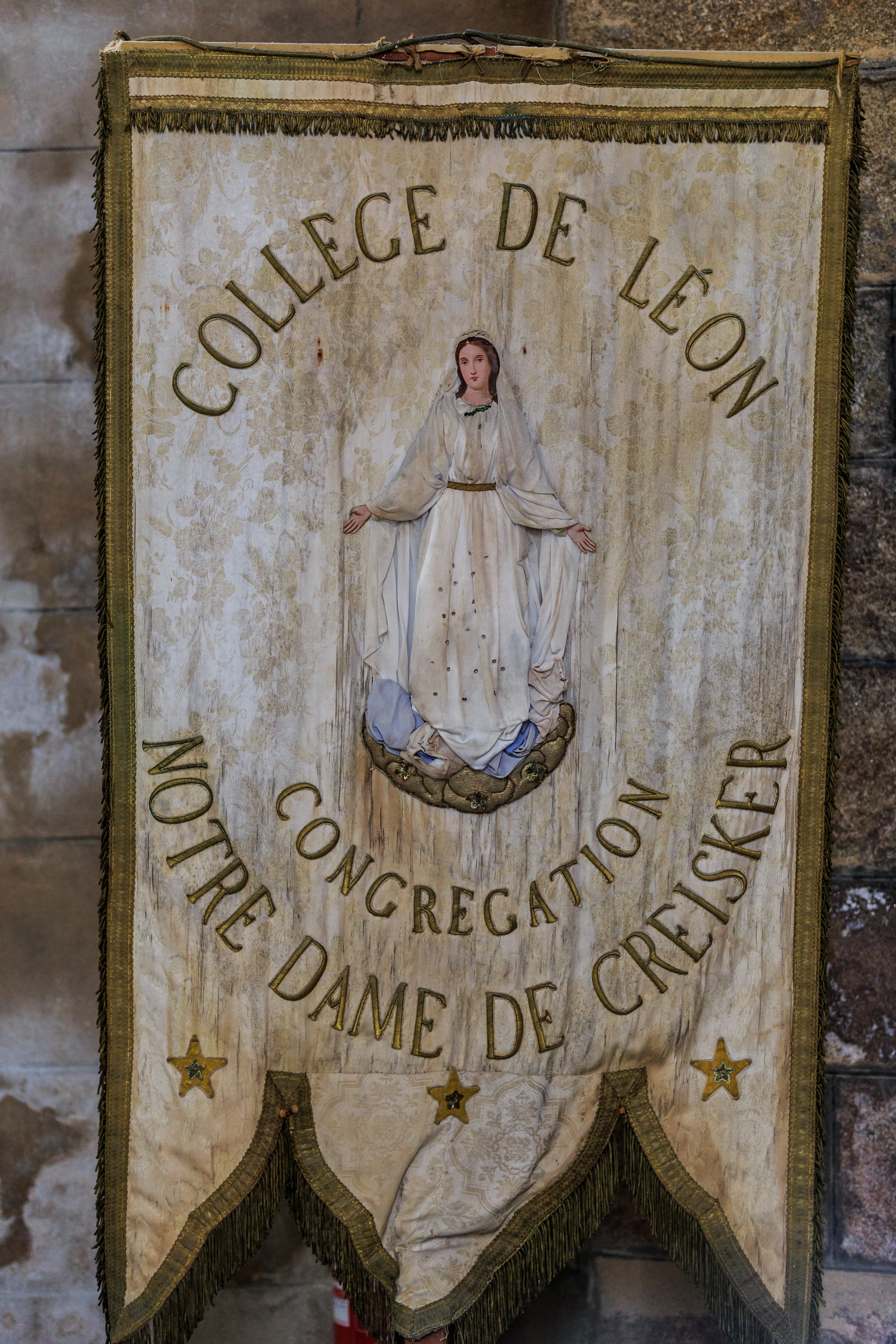 Ancienne bannière du Collège de Léon "congrégation Notre Dame de Creisker" dans la chapelle Notre-Dame-du-Kreisker à Saint-Pol-de-Léon (Finistère).